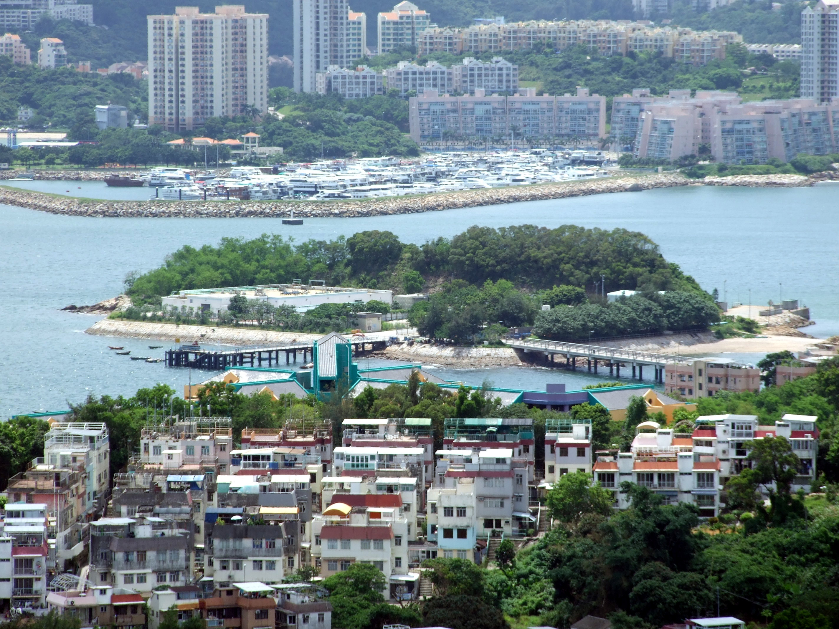 中文（香港）: 大利島